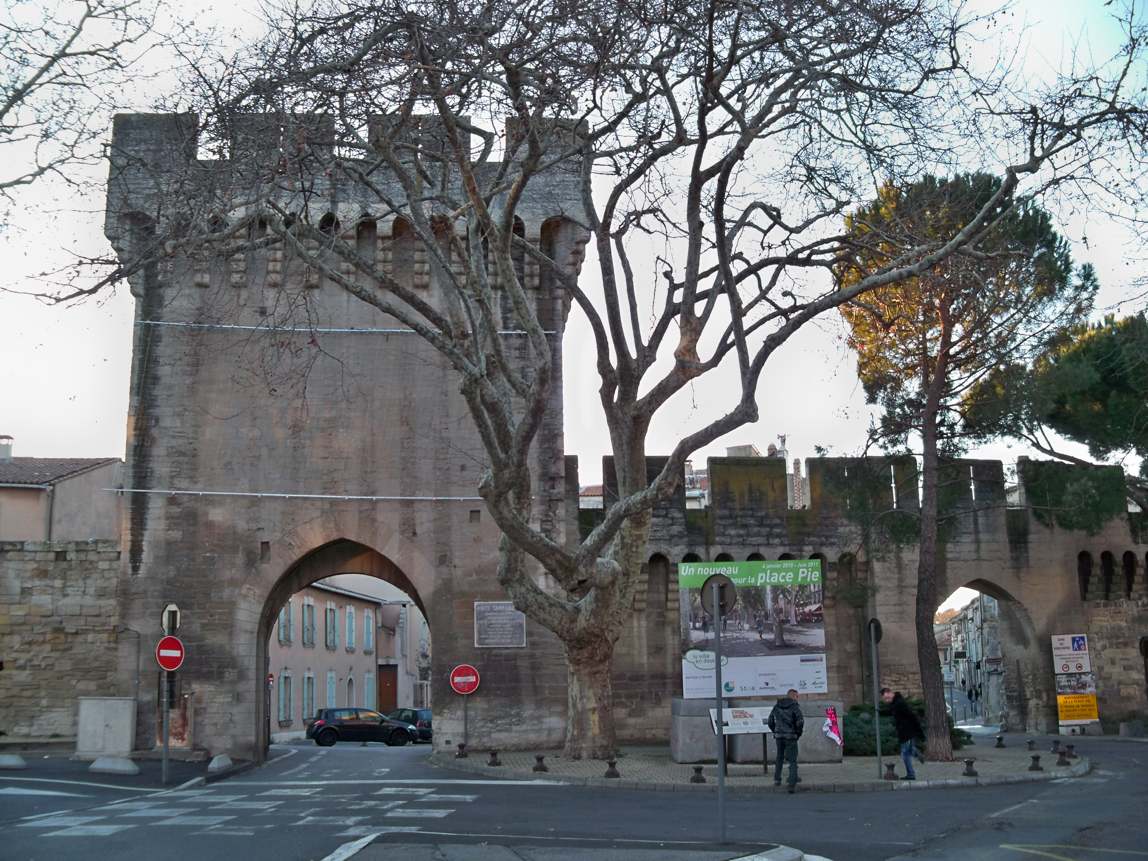 Porte Saint Lazare des remparts d'Avignon, Vaucluse, France